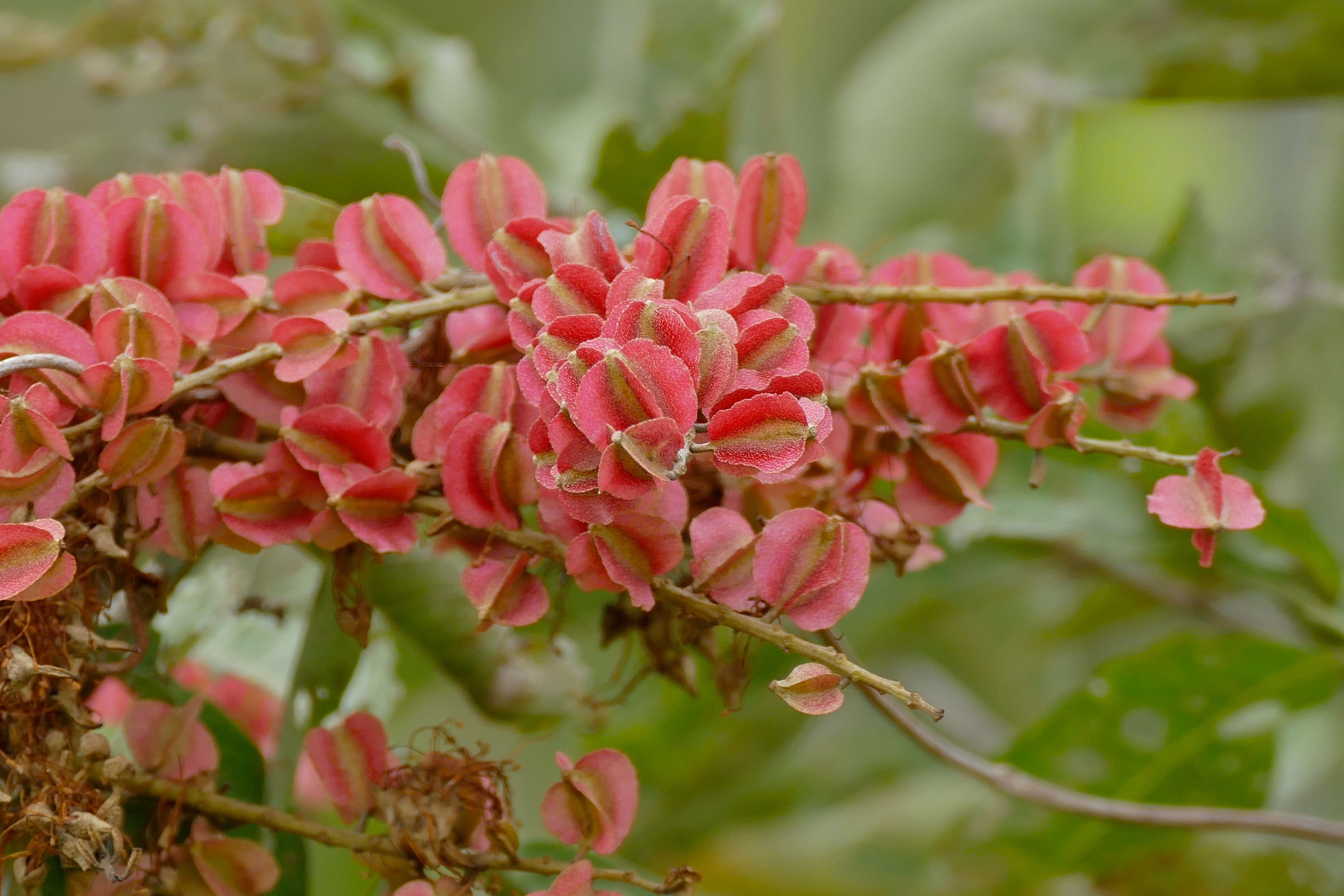 Porto Cercado Road (MT370), Poconé, Mato Grosso, BRAZIL